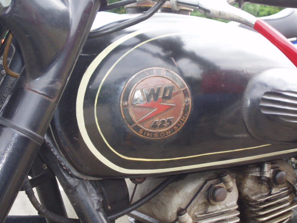 AWO 425, Detailaufnahme